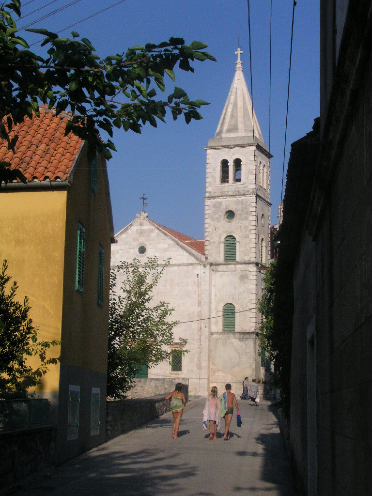 Crkva Zlarin